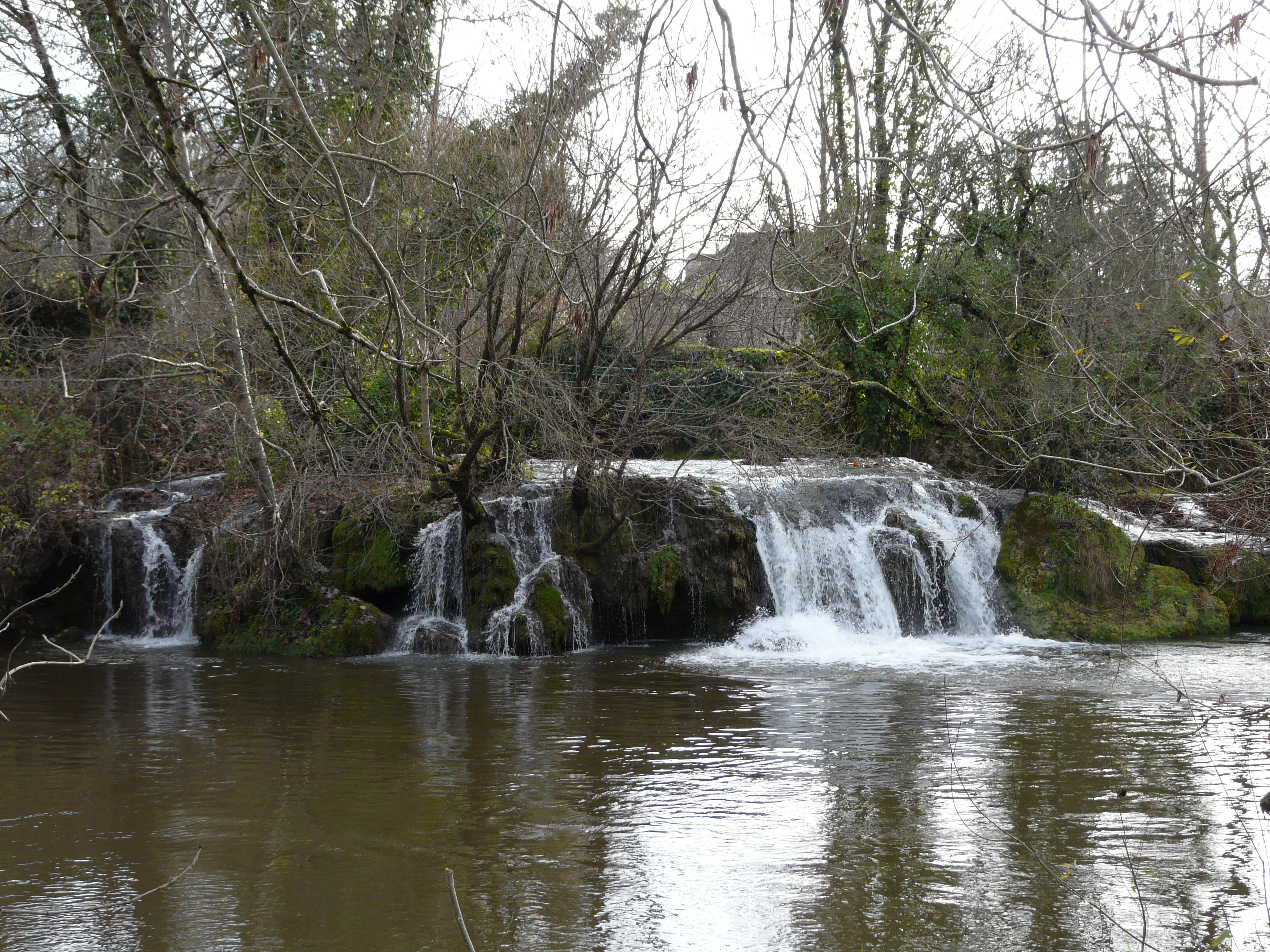 Le Blâme se jette dans l'Auvézère en cascades, lieu-dit les Forges d'Ans, La Boissière-d'Ans, Dordogne, France